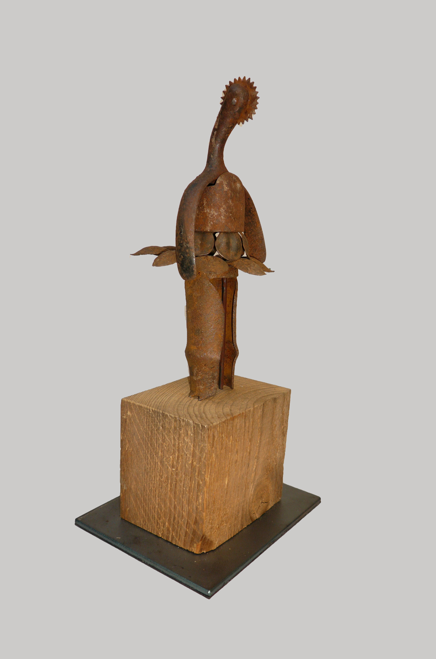 Object trouvé von Josef Caminada